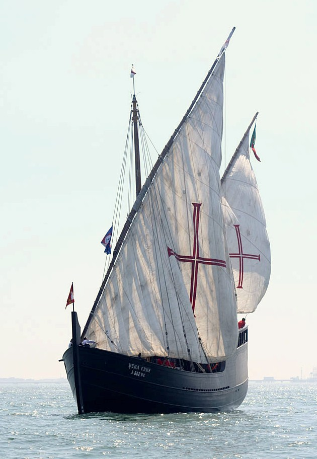 Caravela Vera Cruz no rio Tejo, nas comemorações dos 150 Anos da Associação Naval de Lisboa navegando no Tejo.